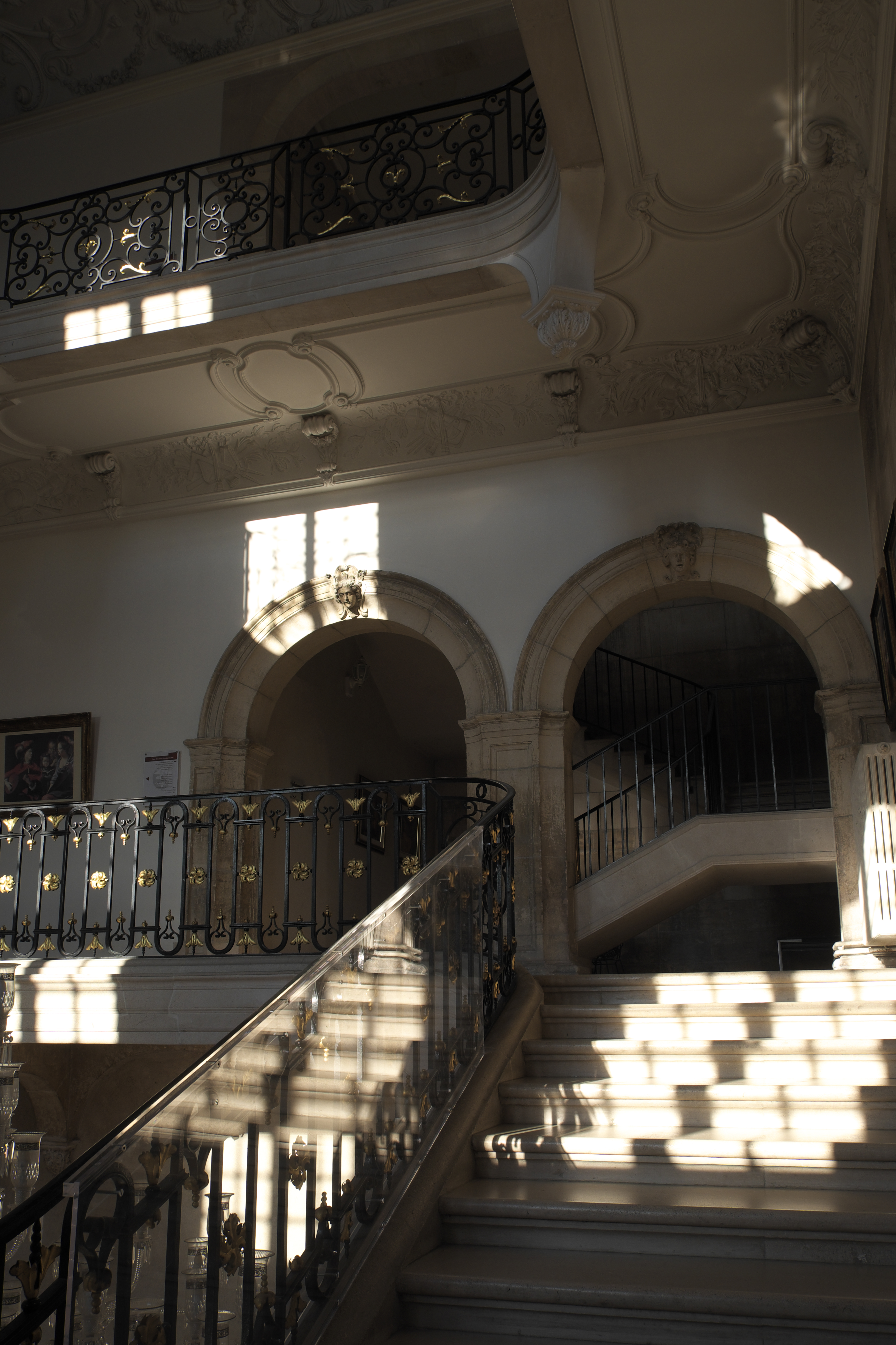 Ehemalige Prämonstratenserabtei in Pont-à-Mousson im Département Meurthe-et-Moselle (Region Grand Est/Frankreich), viereckiges Treppenhaus